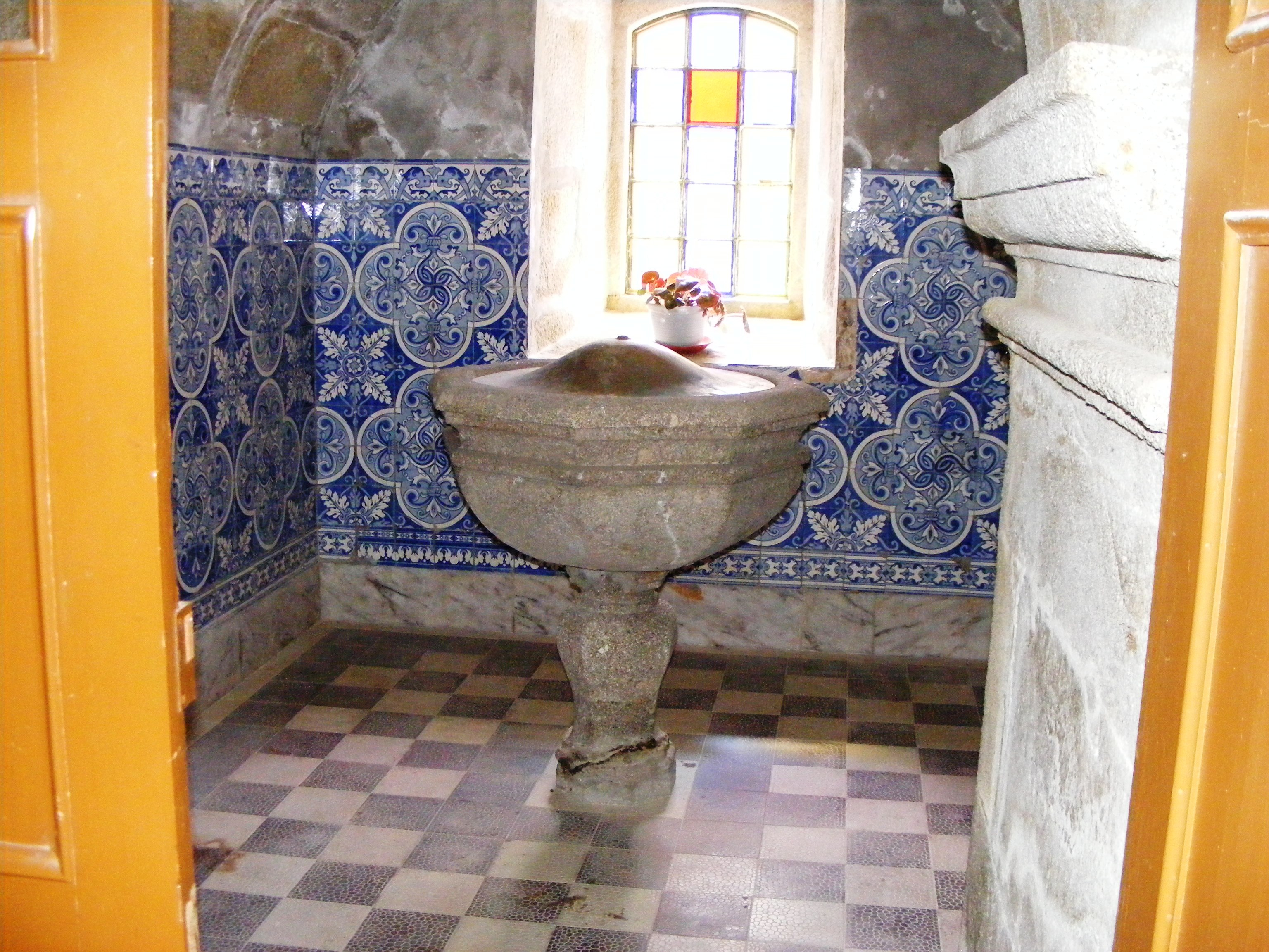 Pia baptismal, em granito oitavado, sob a torre, Igreja de Argoncilhe.